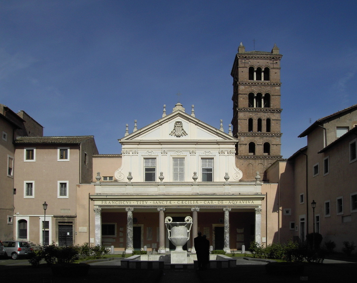 Roma, Santa Cecilia